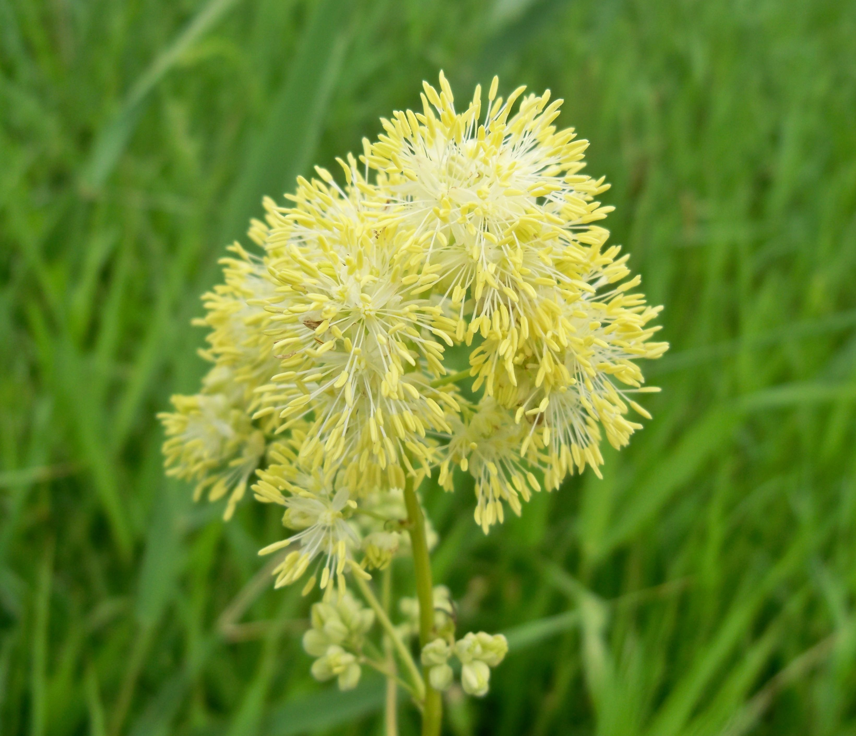 Rutewka wąskolistna na wilgotnej łące. Książki, powiat wąbrzeski.